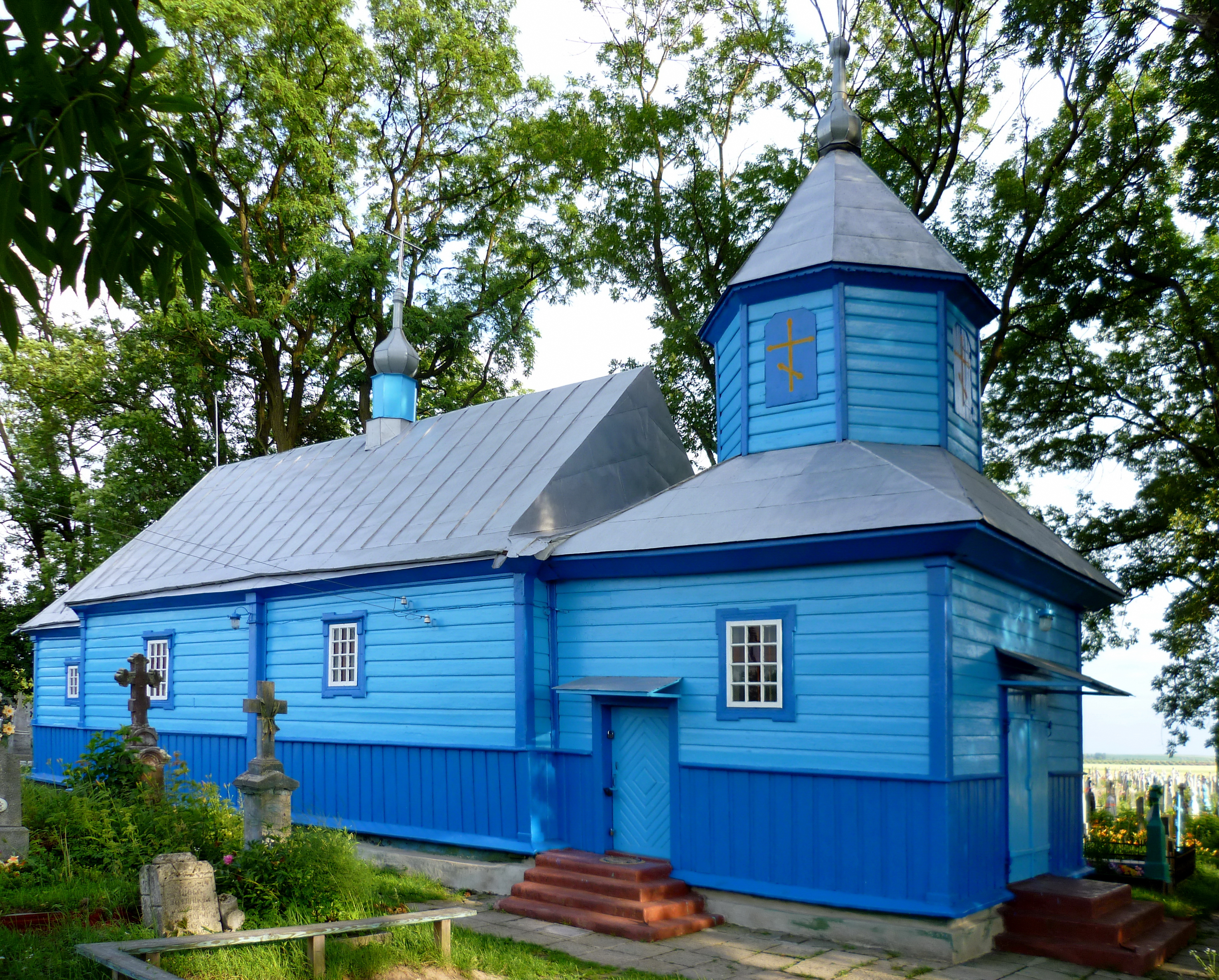 Петропавлівська церква (1764 рік) - загальний вигляд - м.Устилуг (на кладовищі) Володимир-Волинський район Волинська область Україна